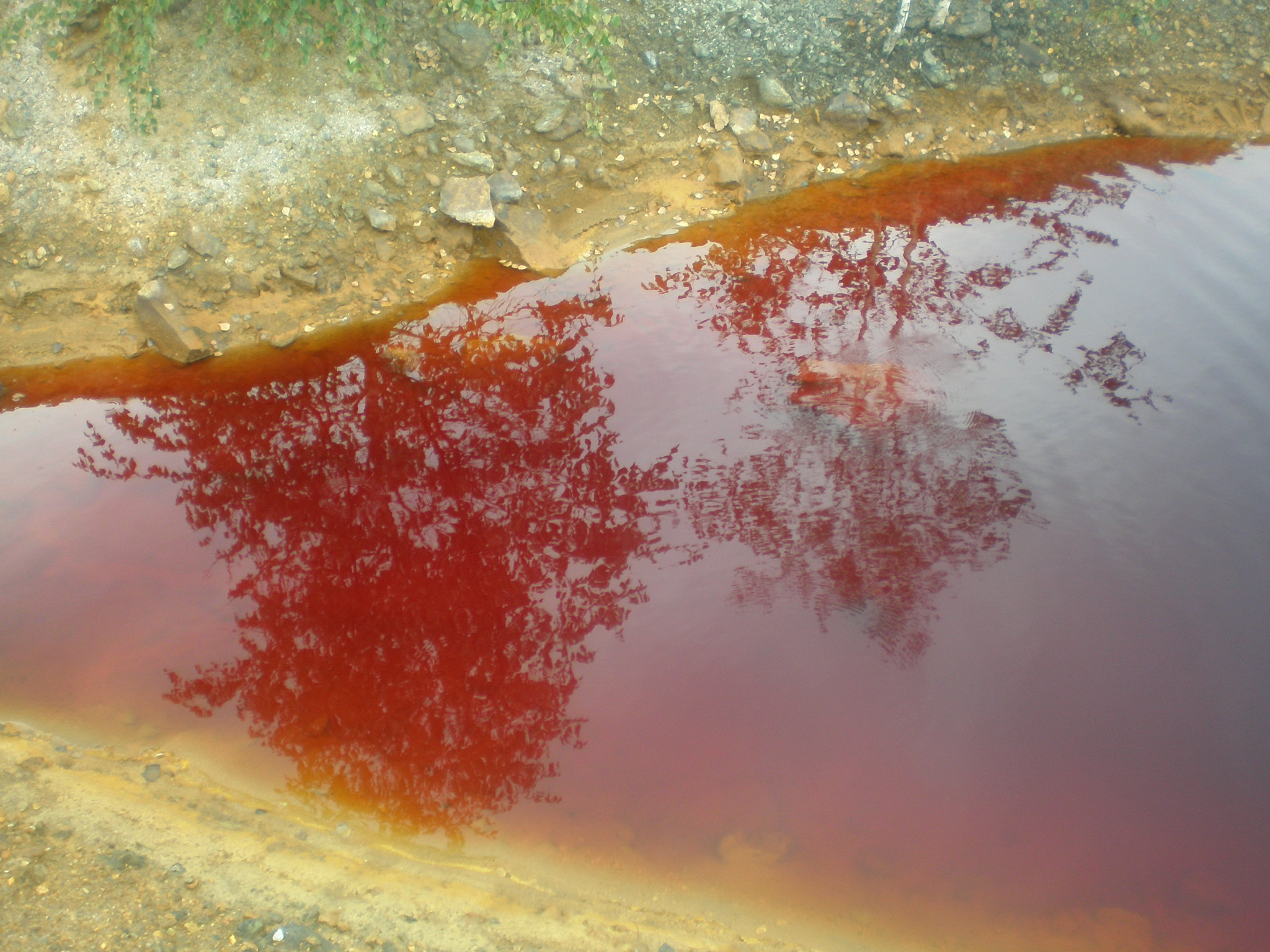 река Сак-Елга Карабаш